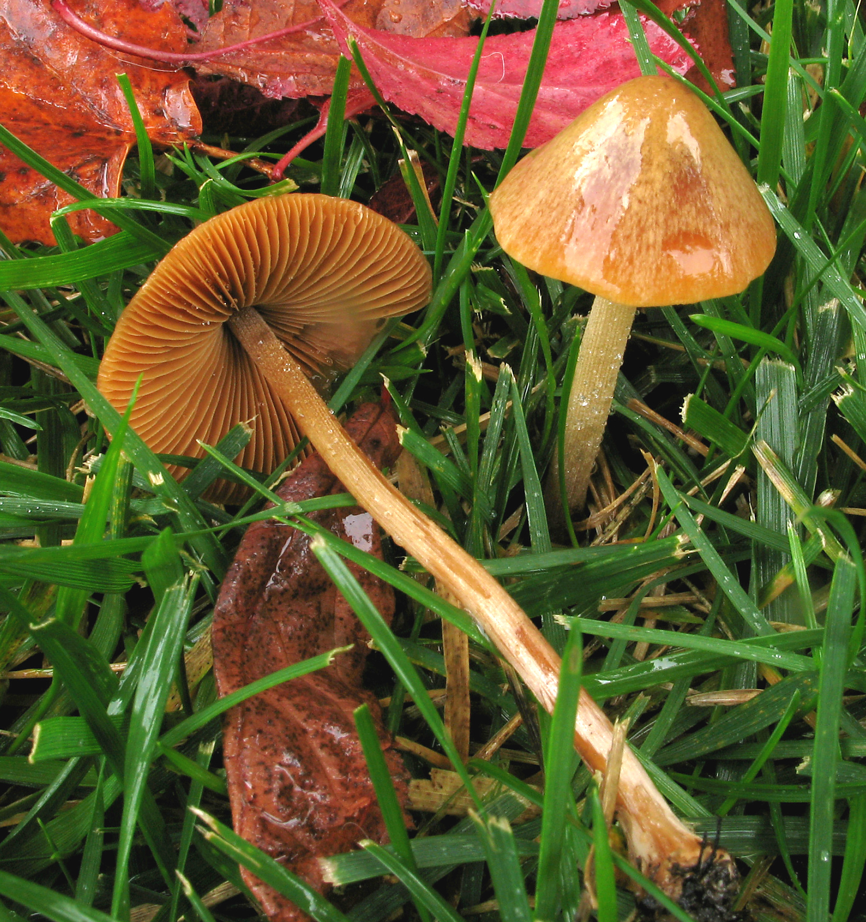 Conocybe siliginea (Fr. :Fr.) Kuhner